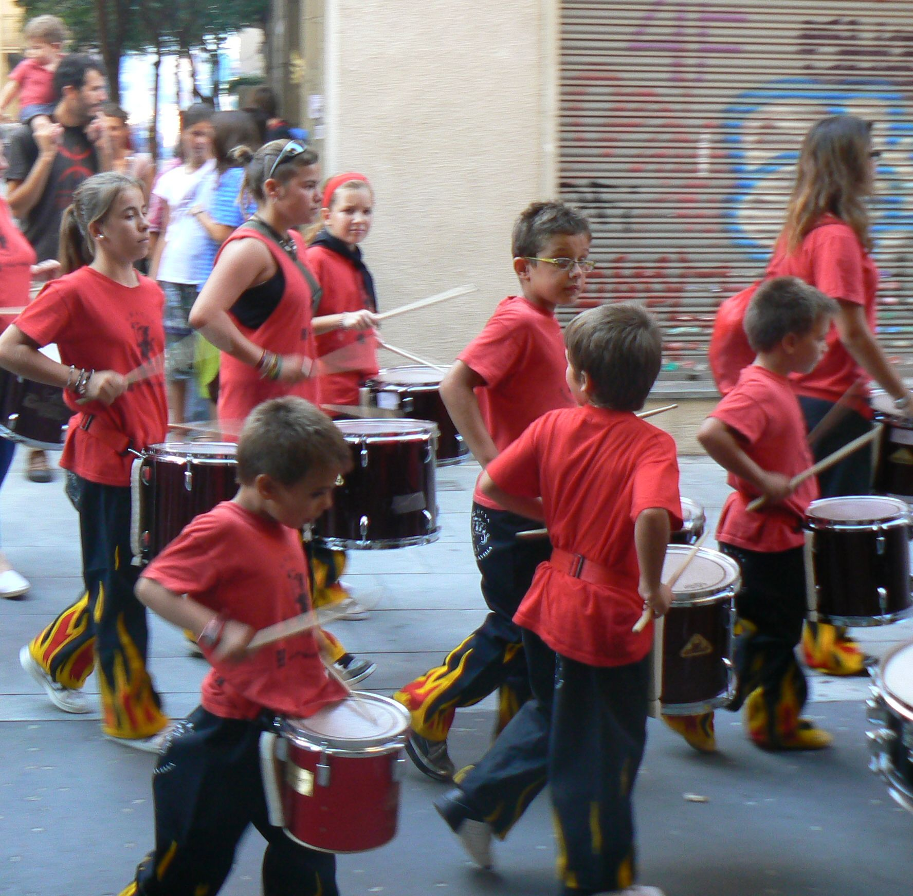 Correfoc infantil a les festes majors del barri de Gràcia, a Barcelona.